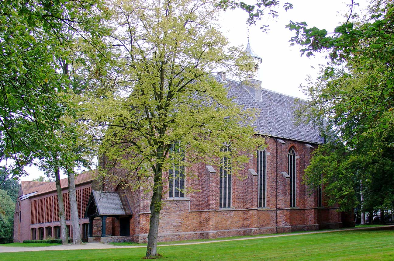 Klooster Ter Apel met uitbreiding